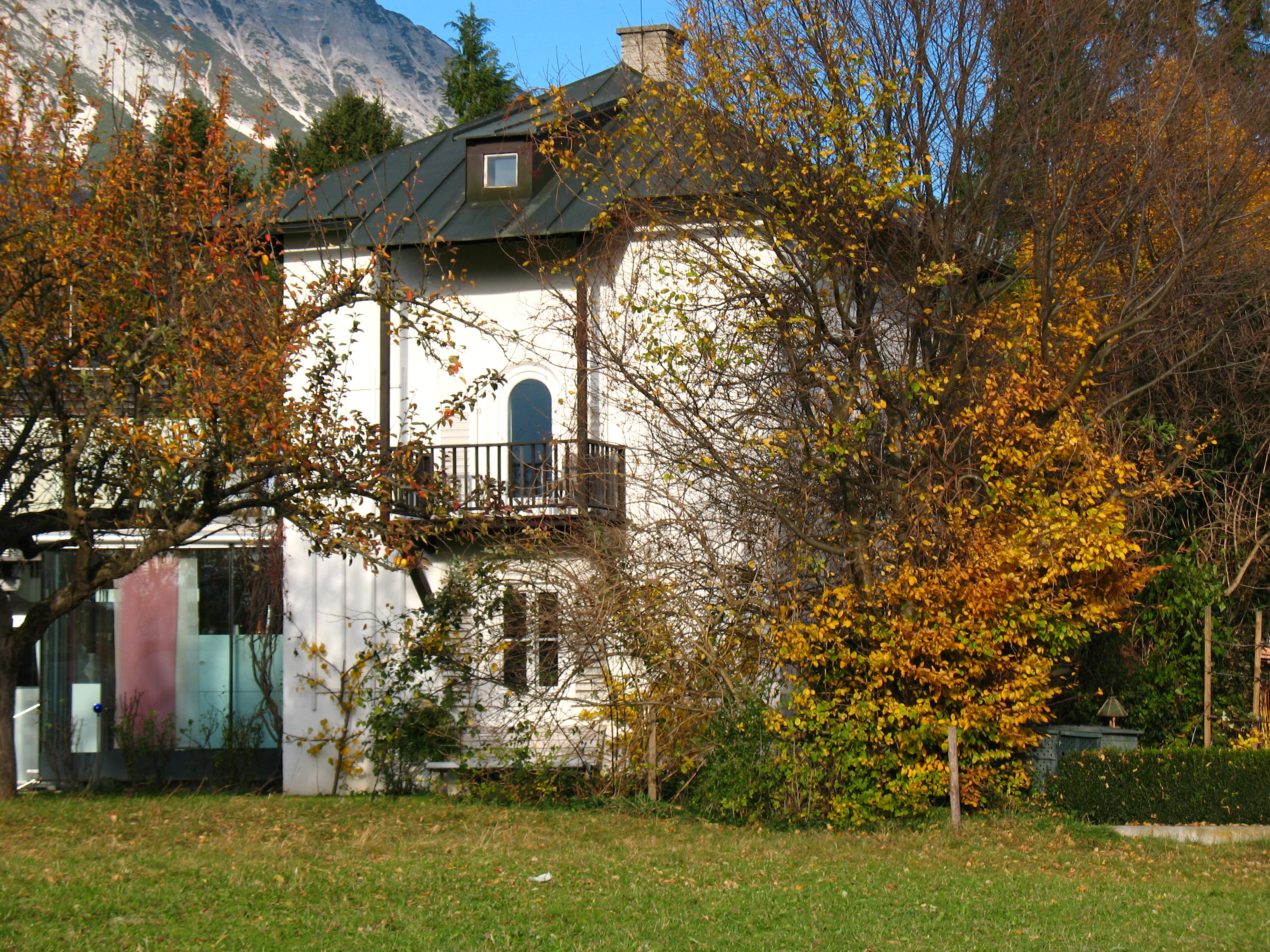 Wohnhaus des Architekten Lois Welzenbach, Welzenbacher-Haus